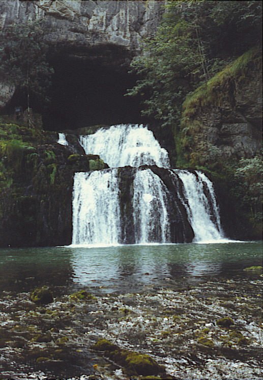 Wiederauftauchen des Flusses Lison (Doubs) aus dem Karst.